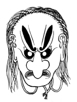 Бато - маска бугаку